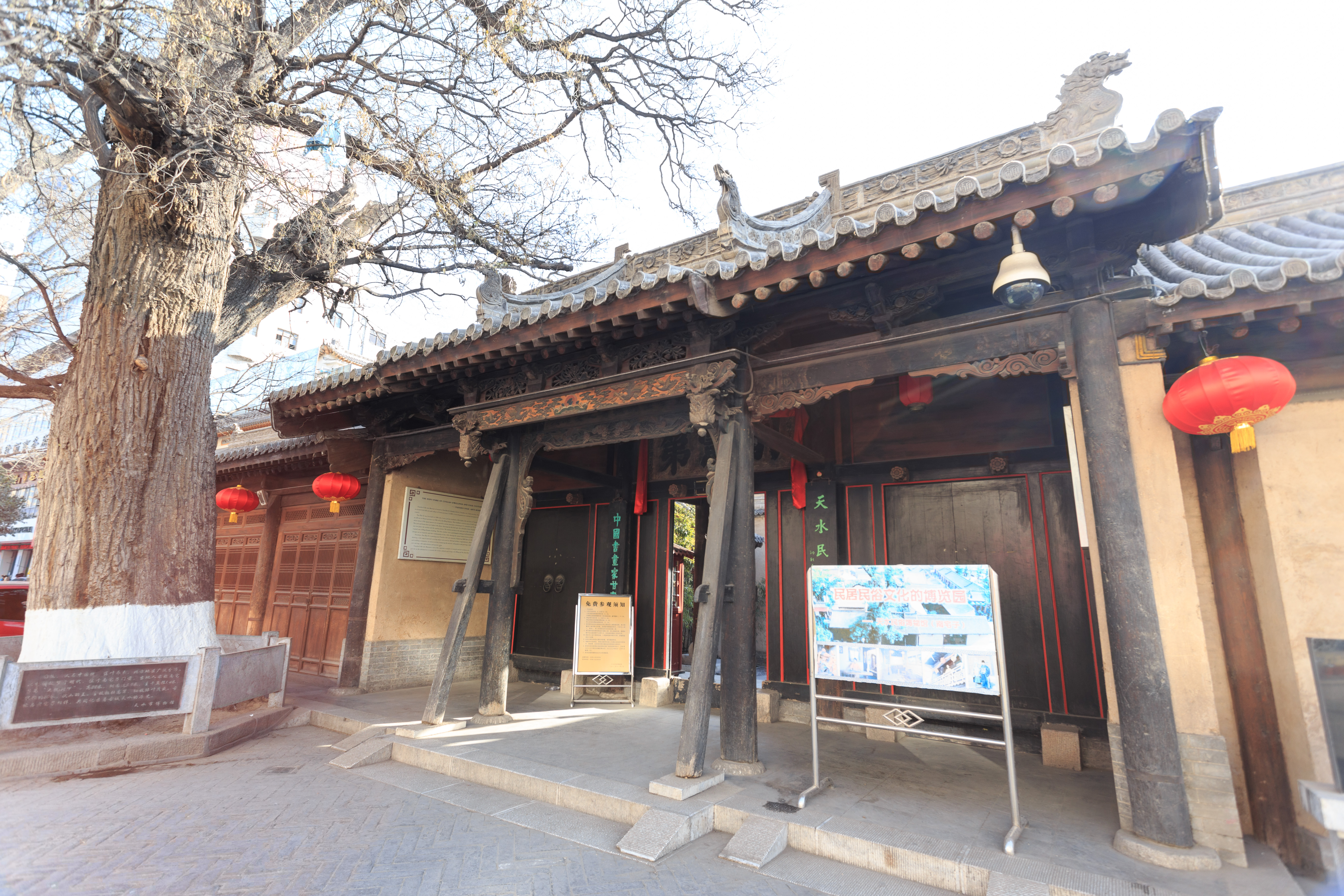 天水胡氏古民居建筑